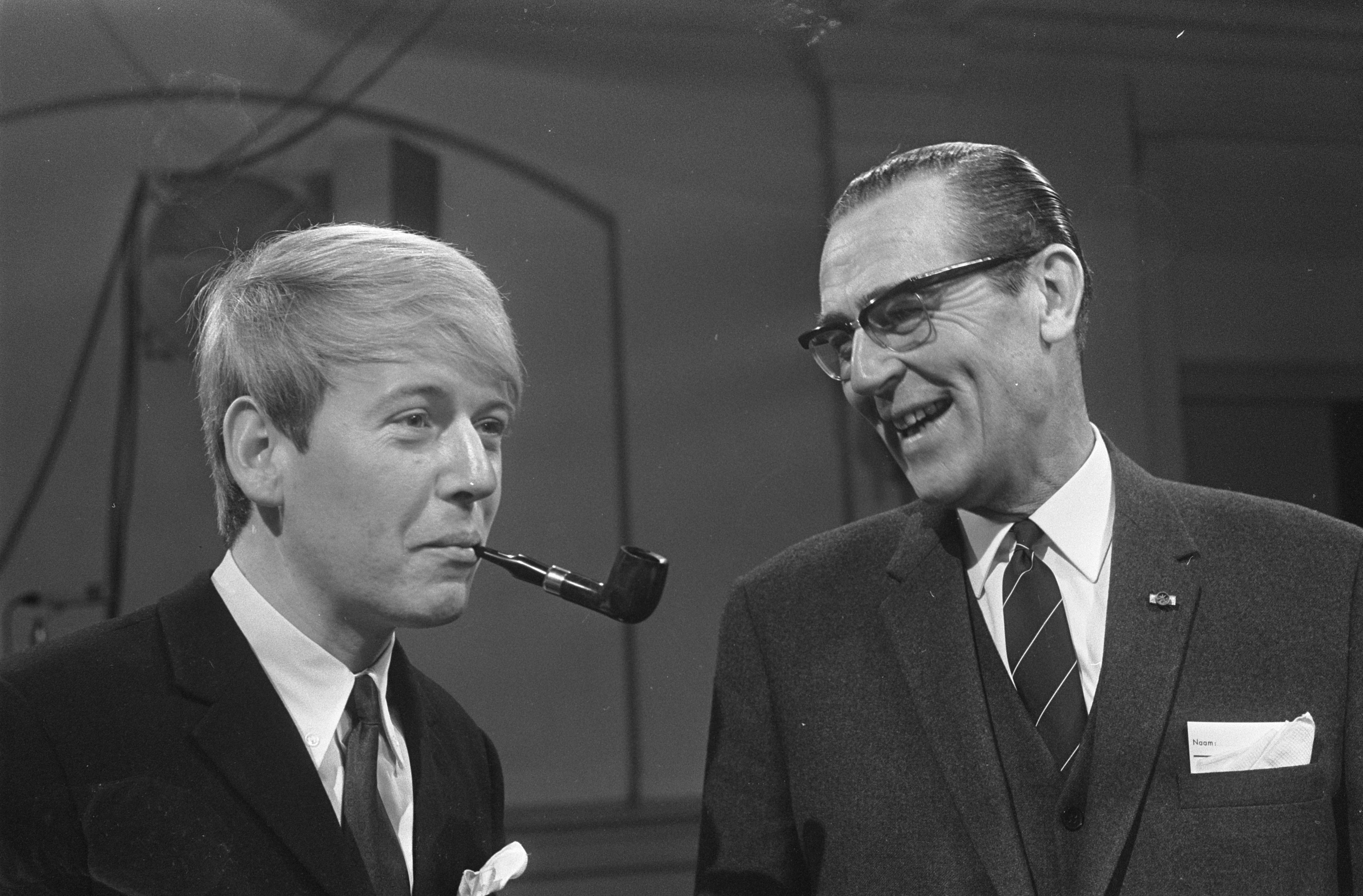 Collectie / Archief : Fotocollectie Anefo Reportage / Serie : [ onbekend ] Beschrijving : KVP-vergadering te Arnhem, KVP-voorzitter Aalberse met KVP-jongeren-voorzitter Gieleni Datum : 8 december 1967 Locatie : Arnhem Trefwoorden : vergaderingen Instellingsnaam : KVP Fotograaf : Koch, Eric / Anefo Auteursrechthebbende : Nationaal Archief Materiaalsoort : Negatief (zwart/wit) Nummer archiefinventaris : bekijk toegang 2.24.01.05 Bestanddeelnummer : 920-9113